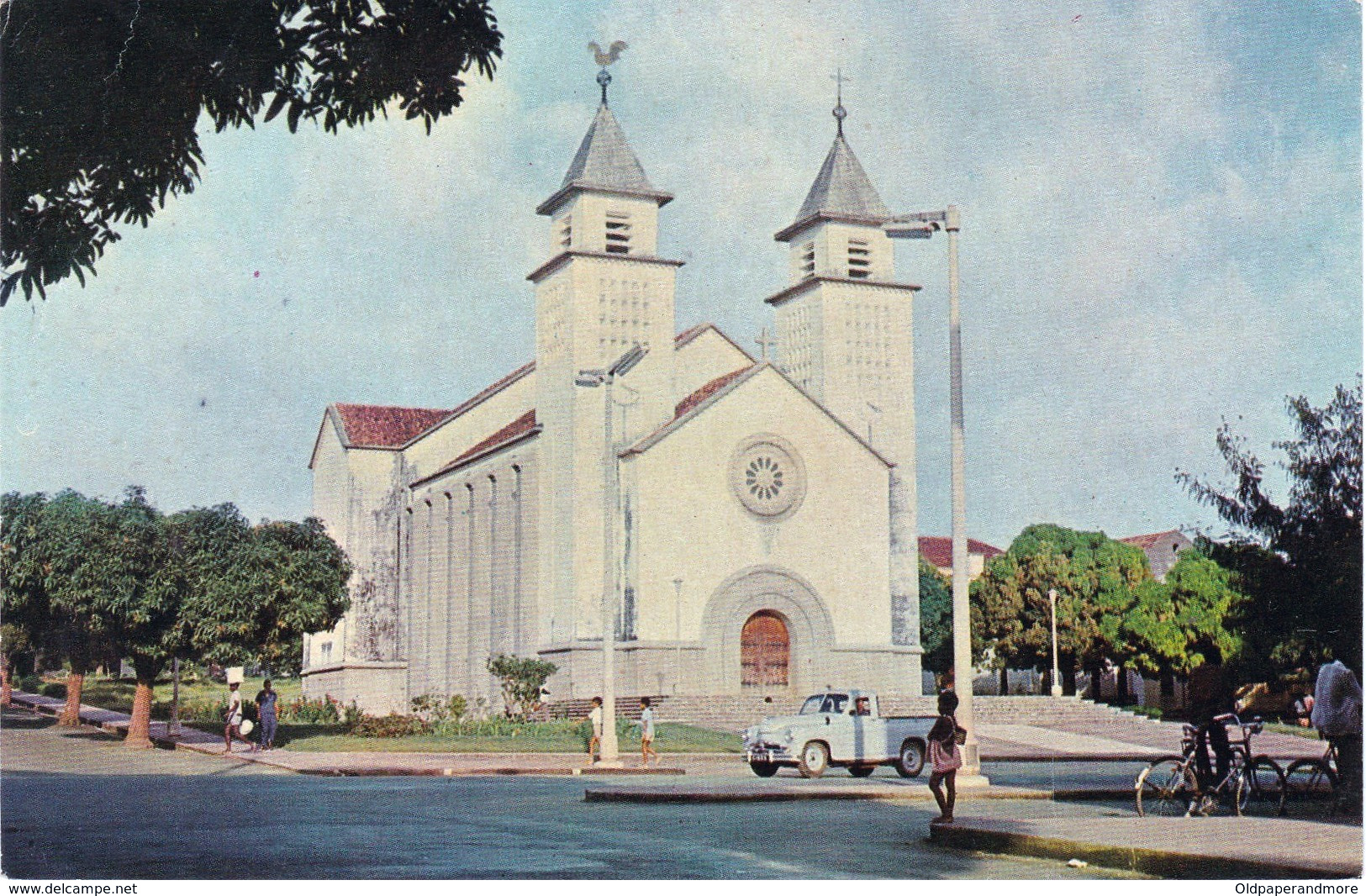 Postcard: Foto Serra No 132 - Catedral de Bissau